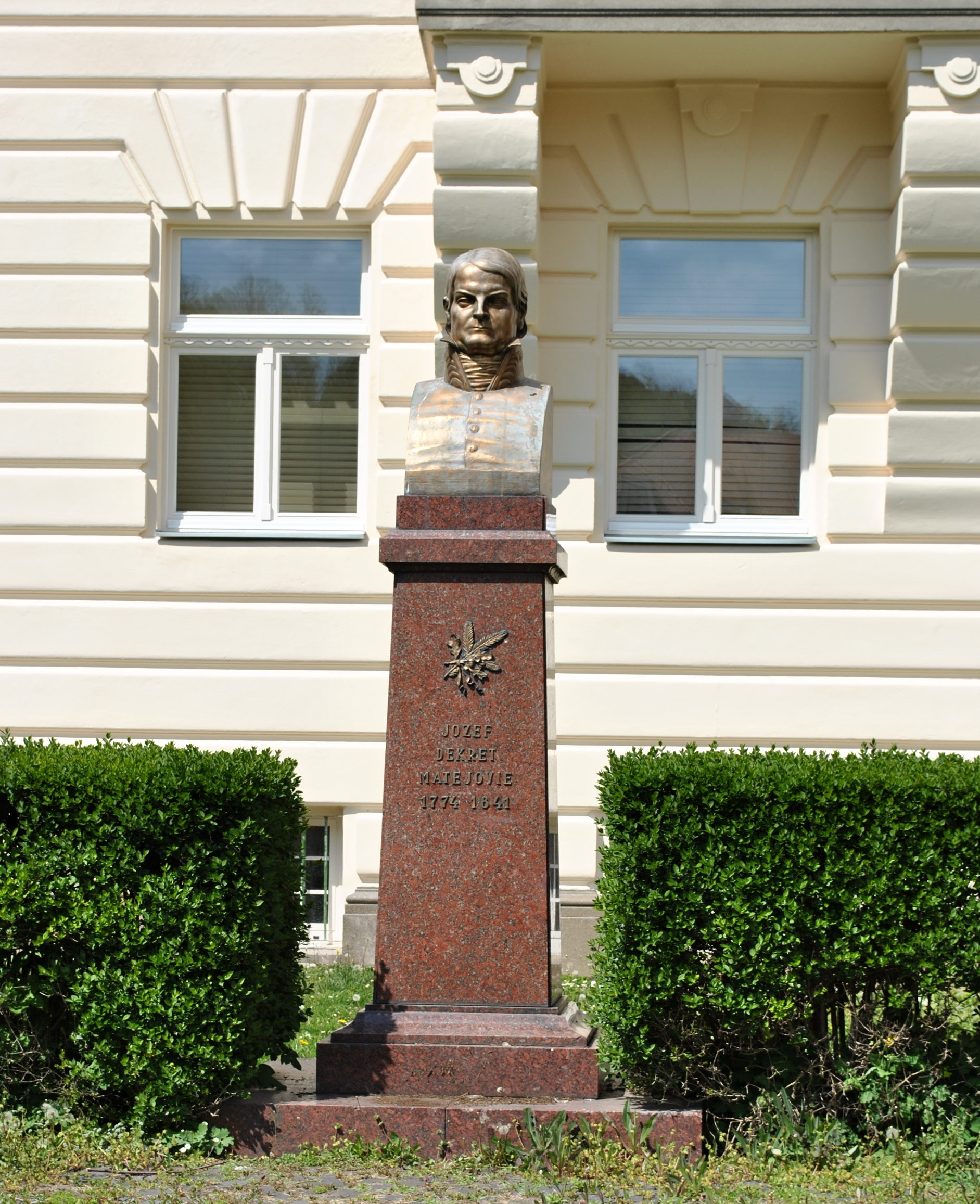 Pomník Jozefa Dekreta Matejovie